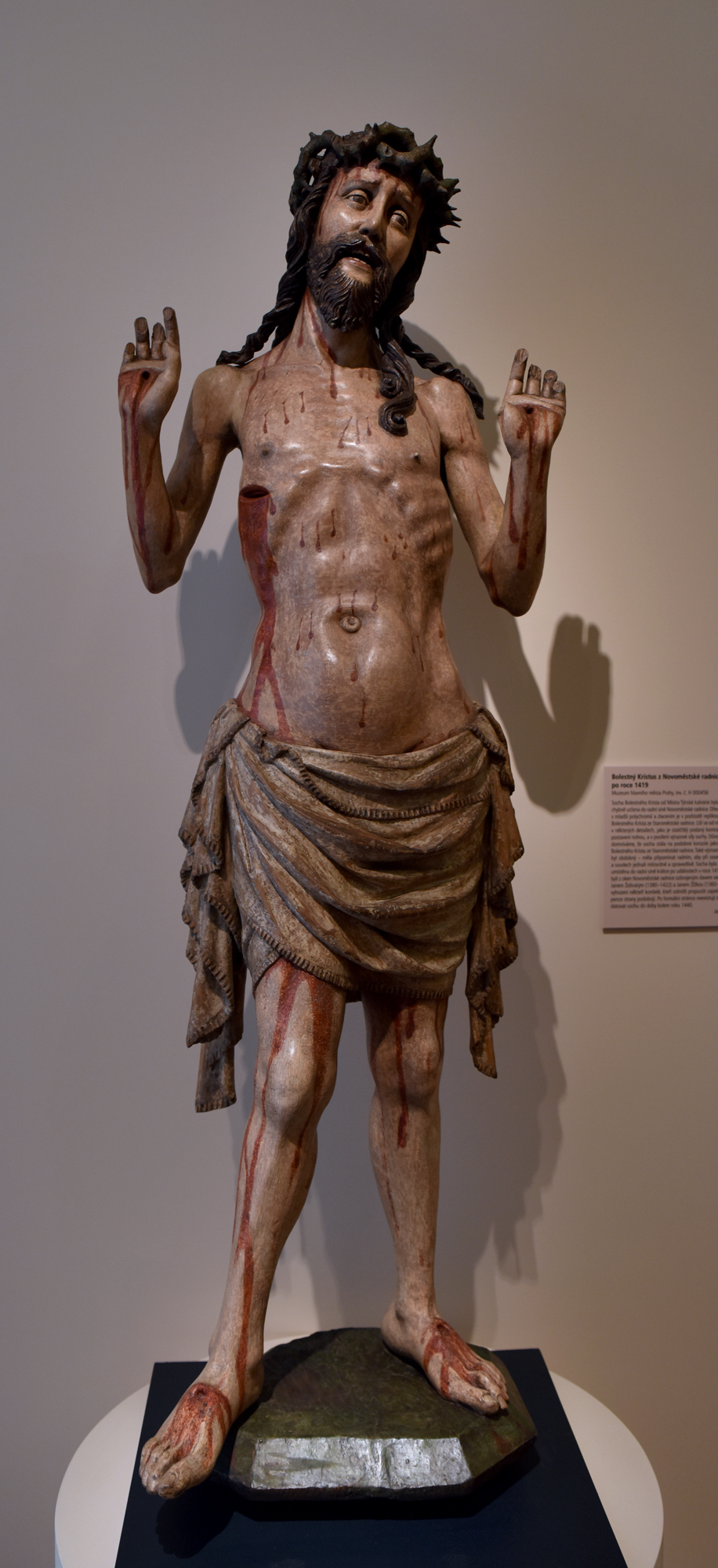 Bolestný Kristus z Novoměstské radnice, Mistr Týnské Kalvárie (po 1419)